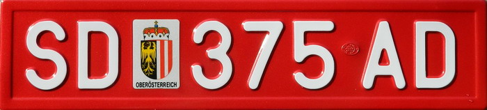 Deckkennzeichen welches gem. §49 Abs. 3 KFG in Österreich an im Ausland zugelassenen Anhängern anzubringen ist, wenn diese in Österreich von einem inländischen Zugfahrzeug gezogen werden.